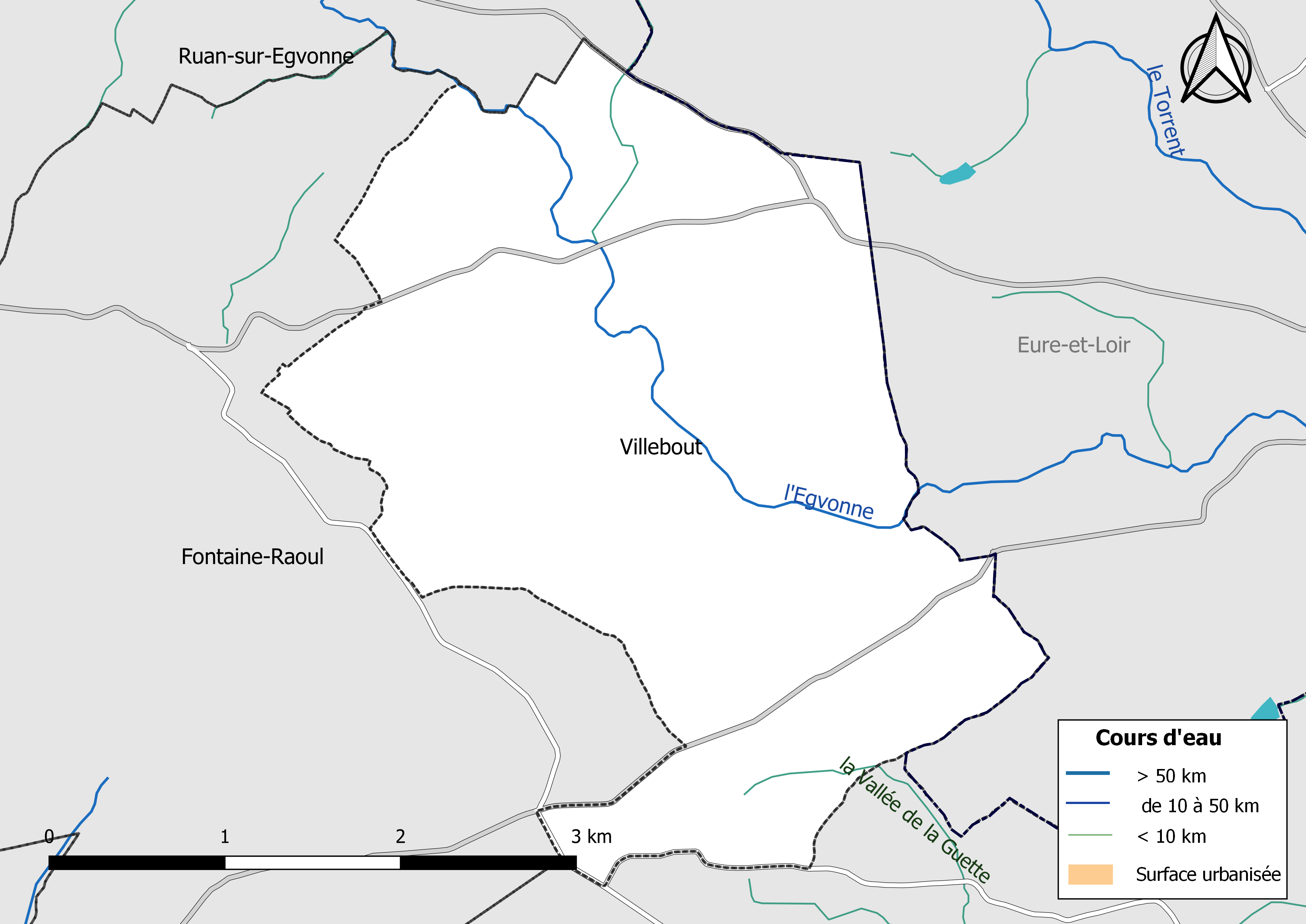 Carte du réseau hydrographique de la commune de Villebout (Loir-et-Cher, France).